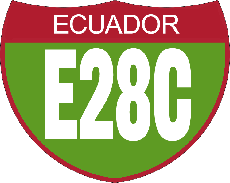 Disco de Identificación Ruta E28C